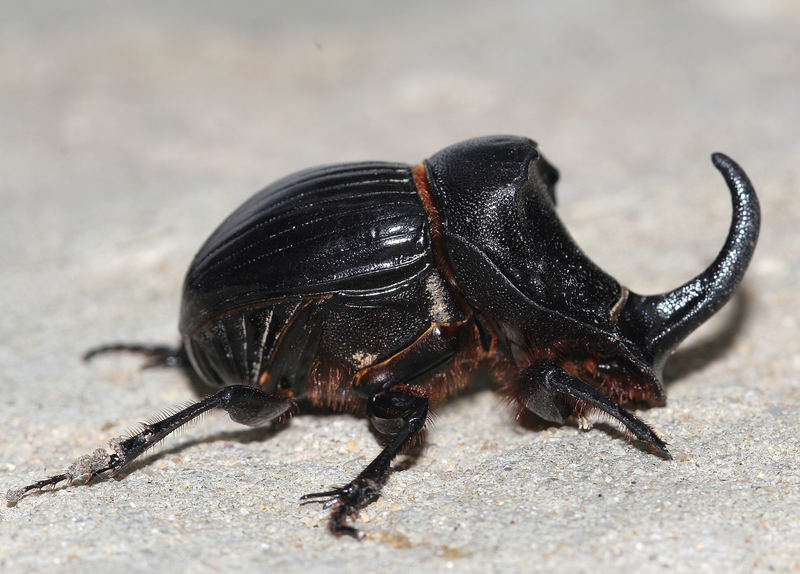 seen in Vejer de la Frontera (Andalusia) length=5cm